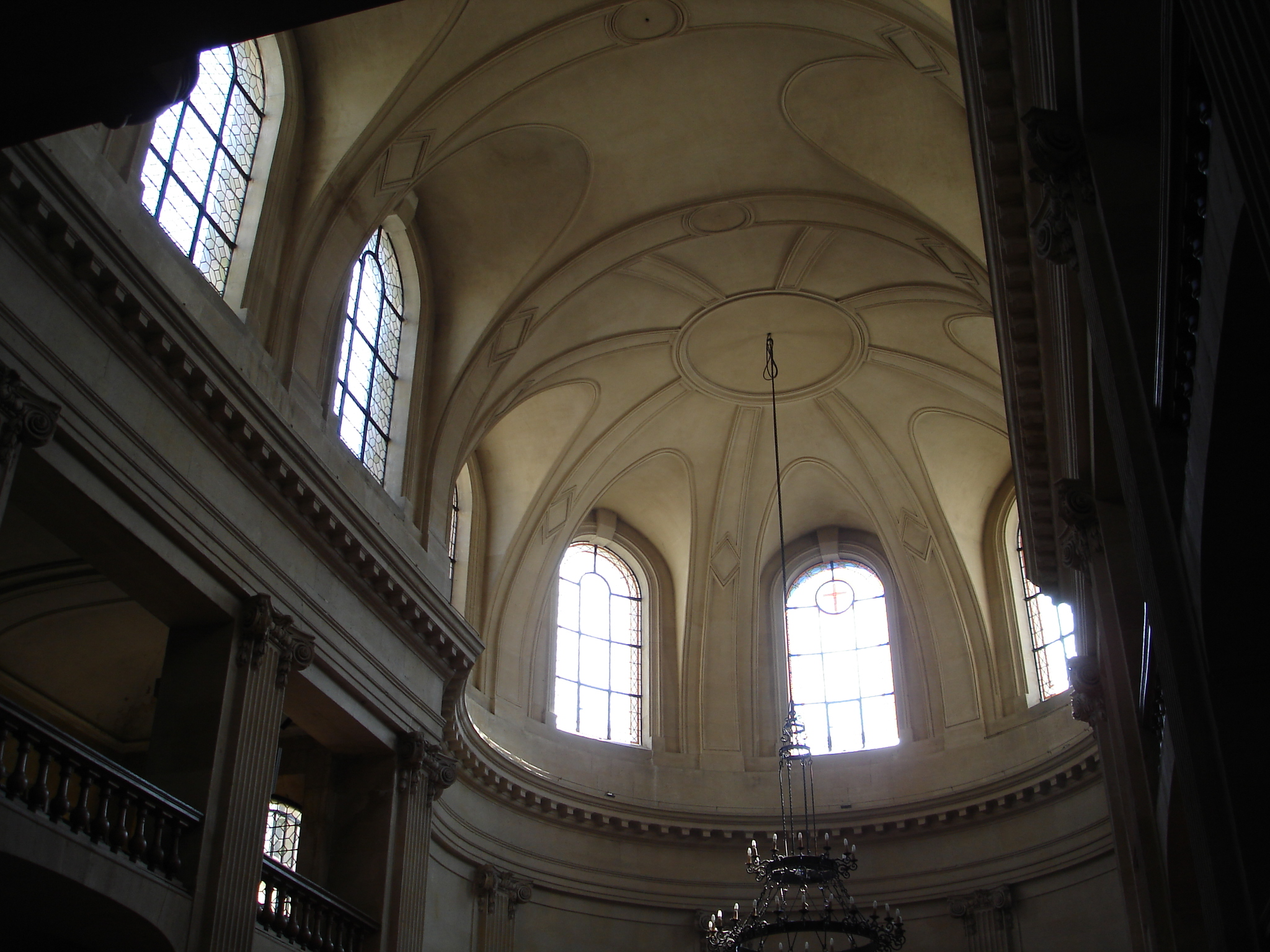 "Église des Billettes": Lutherian church, rue des Archives, Paris (Inside)